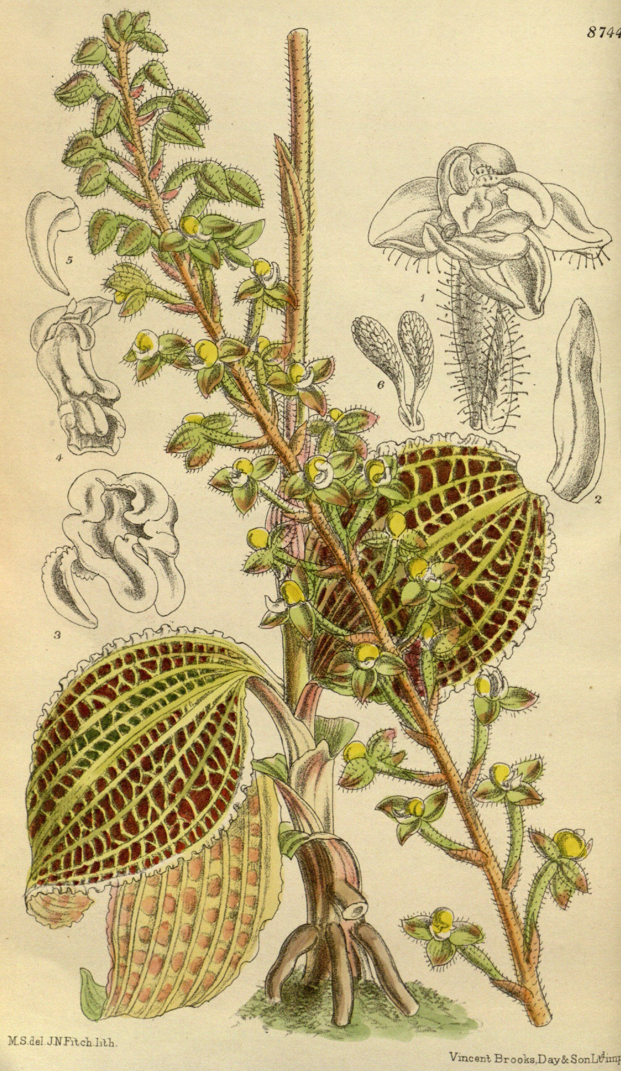 Macodes sanderiana, Orchidaceae